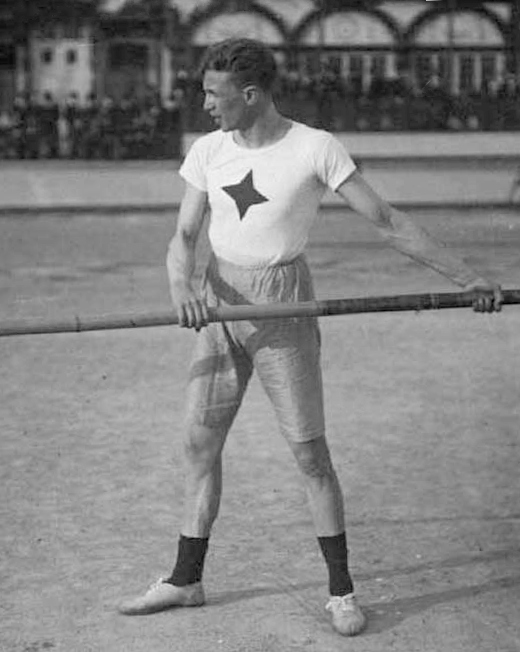 Bruno Söderström (28 October 1881 – 1 January 1969)